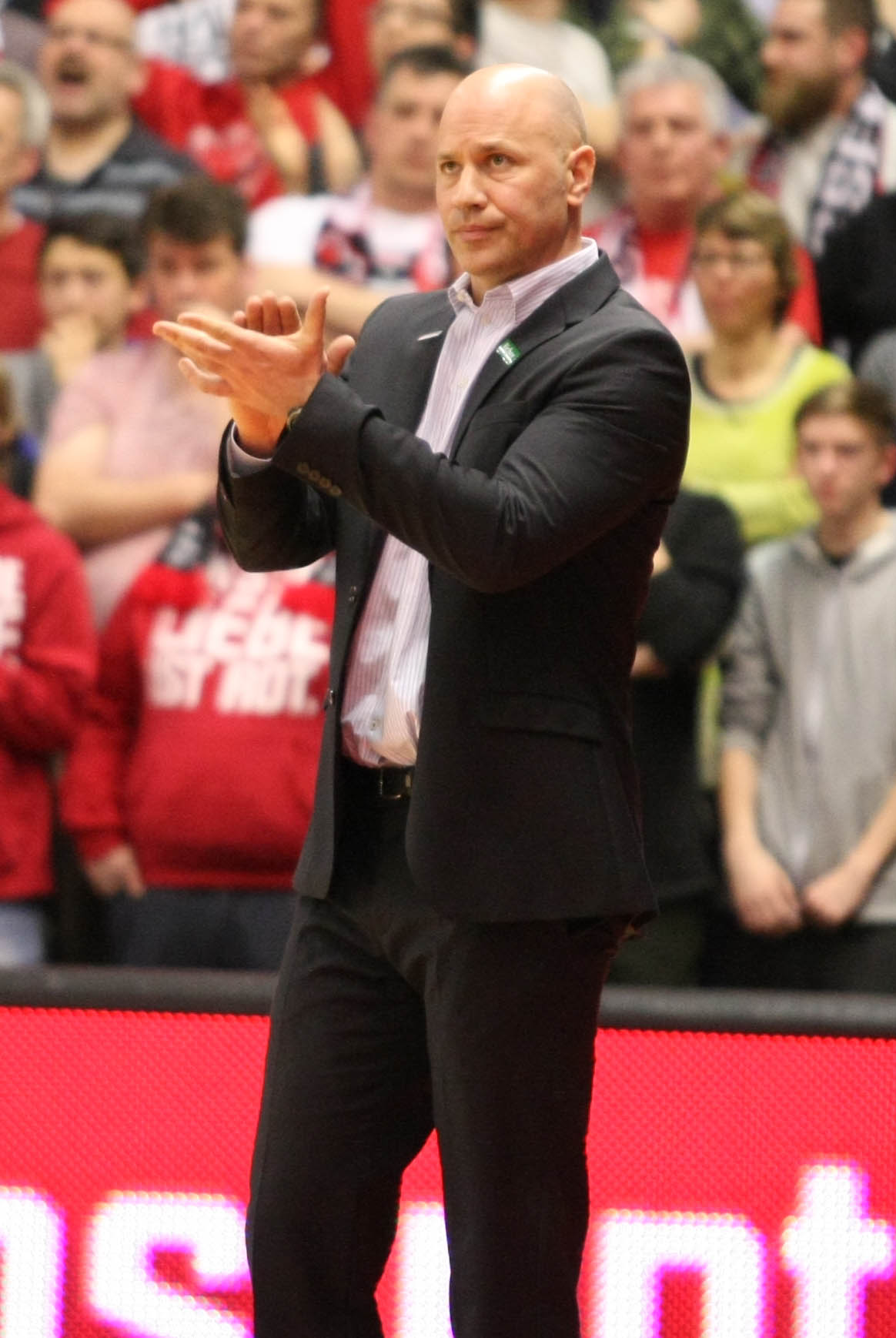 Giessen 46ers / Basketball Löwen Braunschweig (73-71)